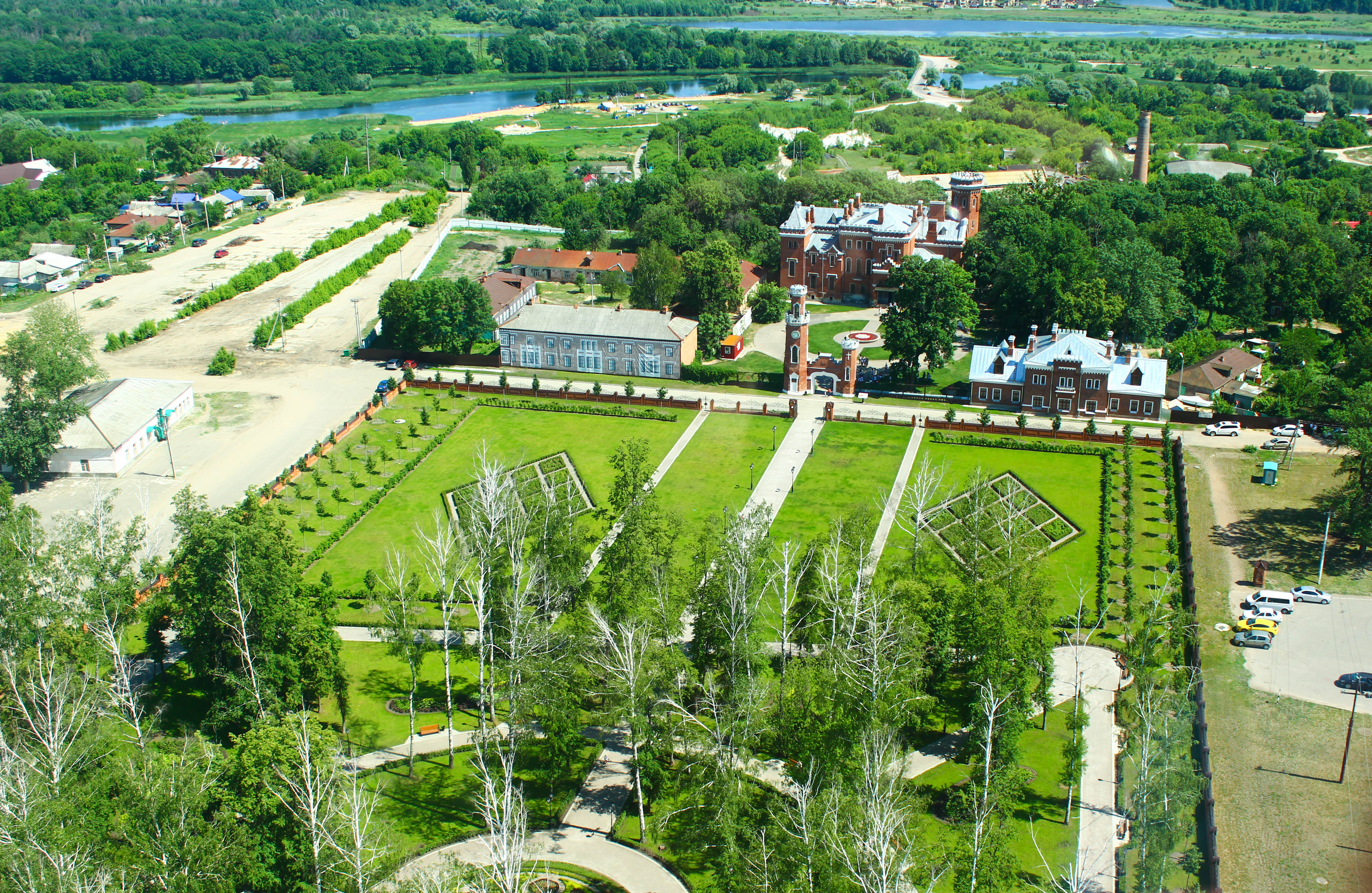 Дворец принцессы Ольденбургской: Рамонь, Рамонский район, Воронежская область